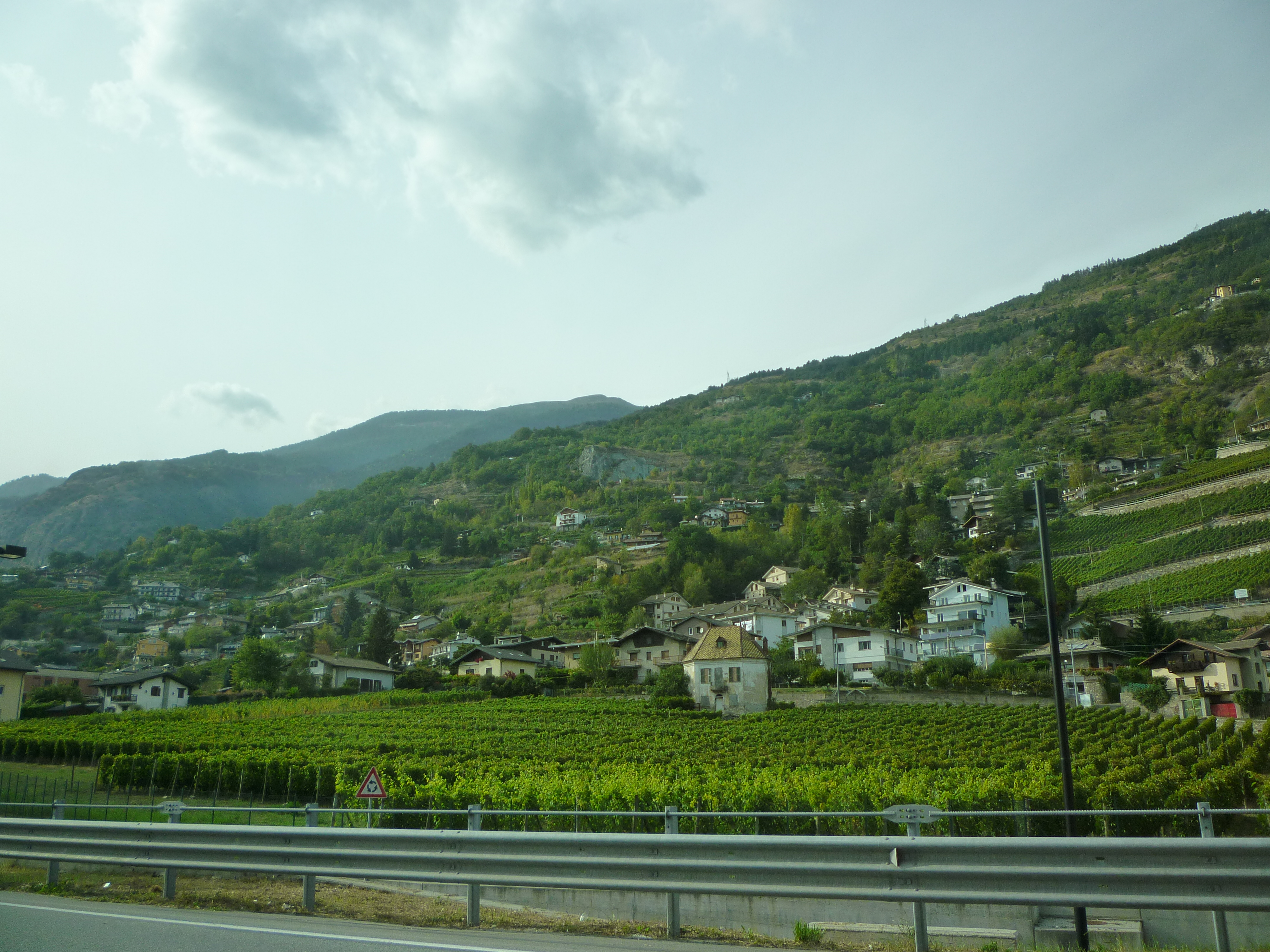 Vignobles de La Rochère à Aoste